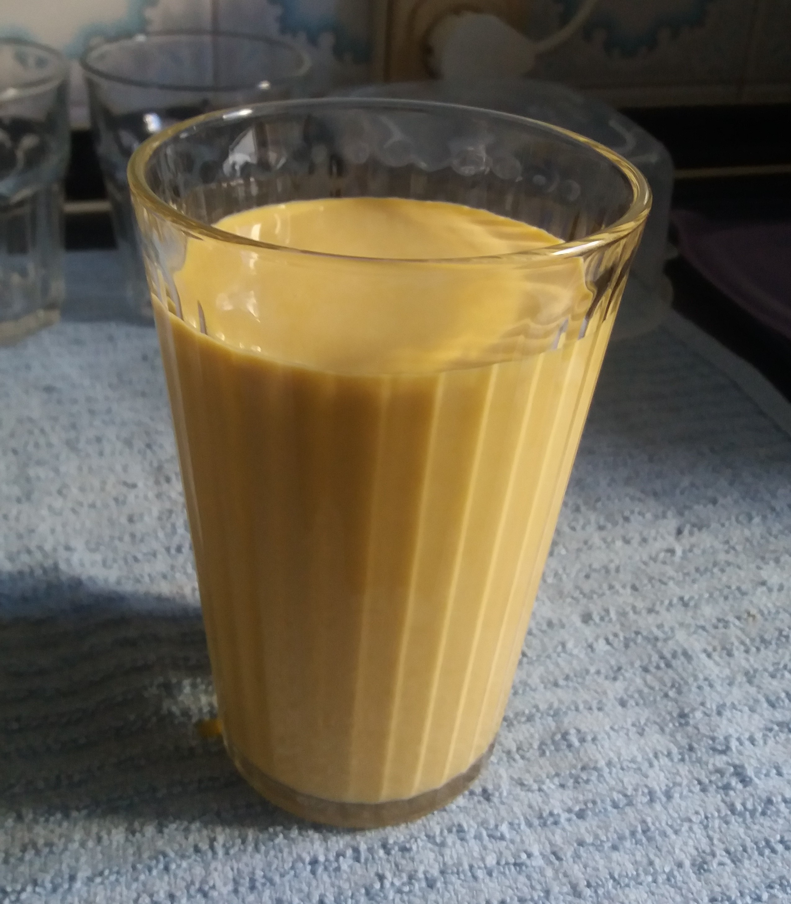 Milkshake de lúcuma